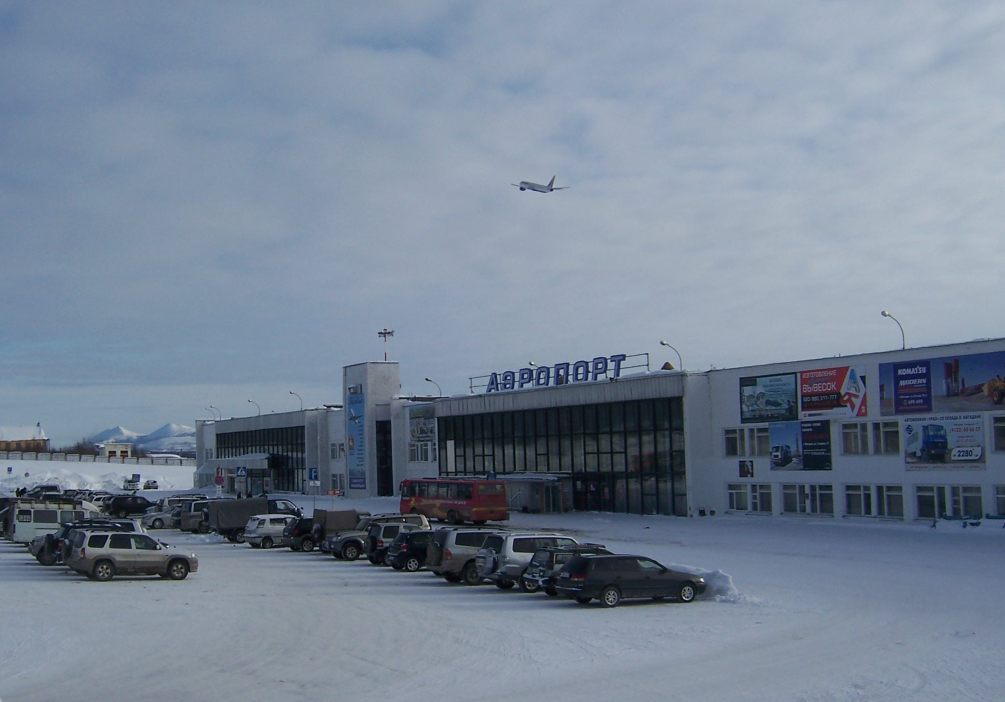 Аэропорт Магадан. Аэровокзал со стороны привокзальной площади